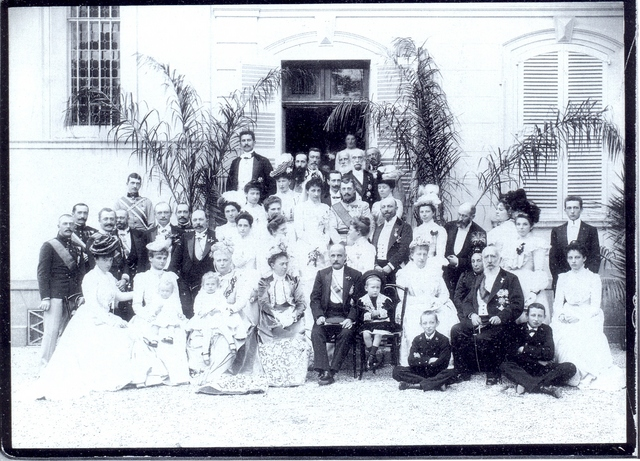 Matrimonio di Pietro Ferdinando di Lorena, principe di Toscana, e di Maria Cristina di Borbone, principessa delle Due Sicilie.